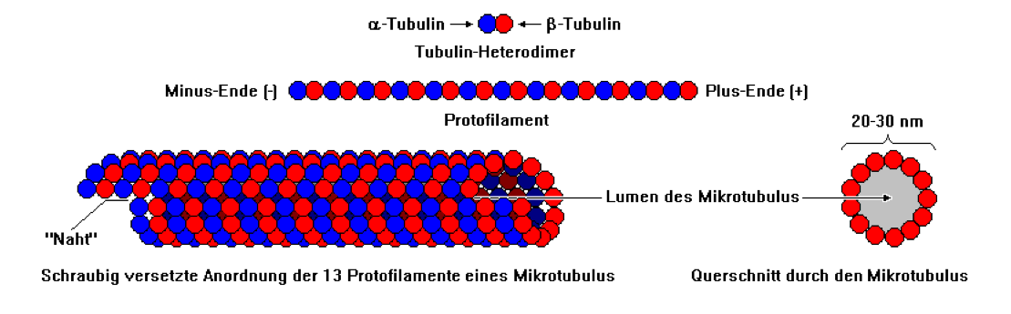 Tubulinmoleküle geben dem Mikrotubulus eine eindeutige Richtung